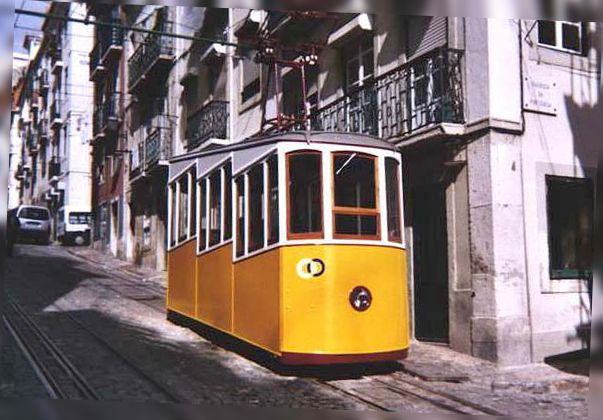 Funiculaire de Lisbonne